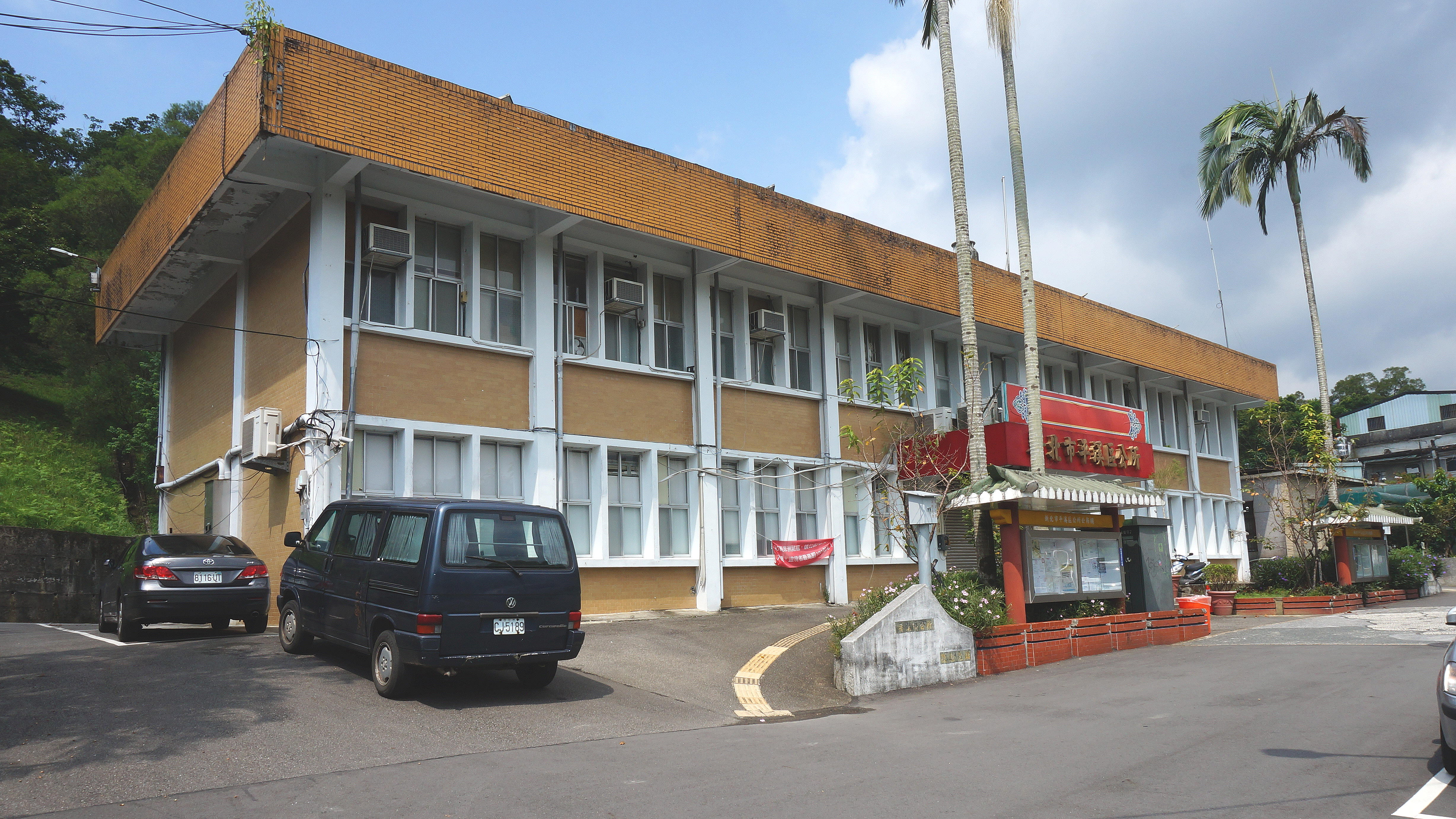 中文（台灣）: 新北市平溪區公所，地址：新北市平溪區平溪街45號。